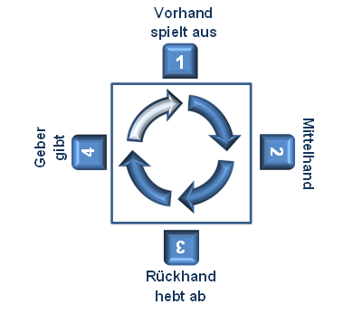 Reihenfolge der Spielansage beim Schafkopf